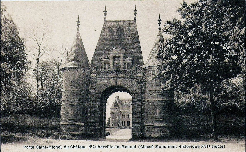 Carte postale du château vers 1910.